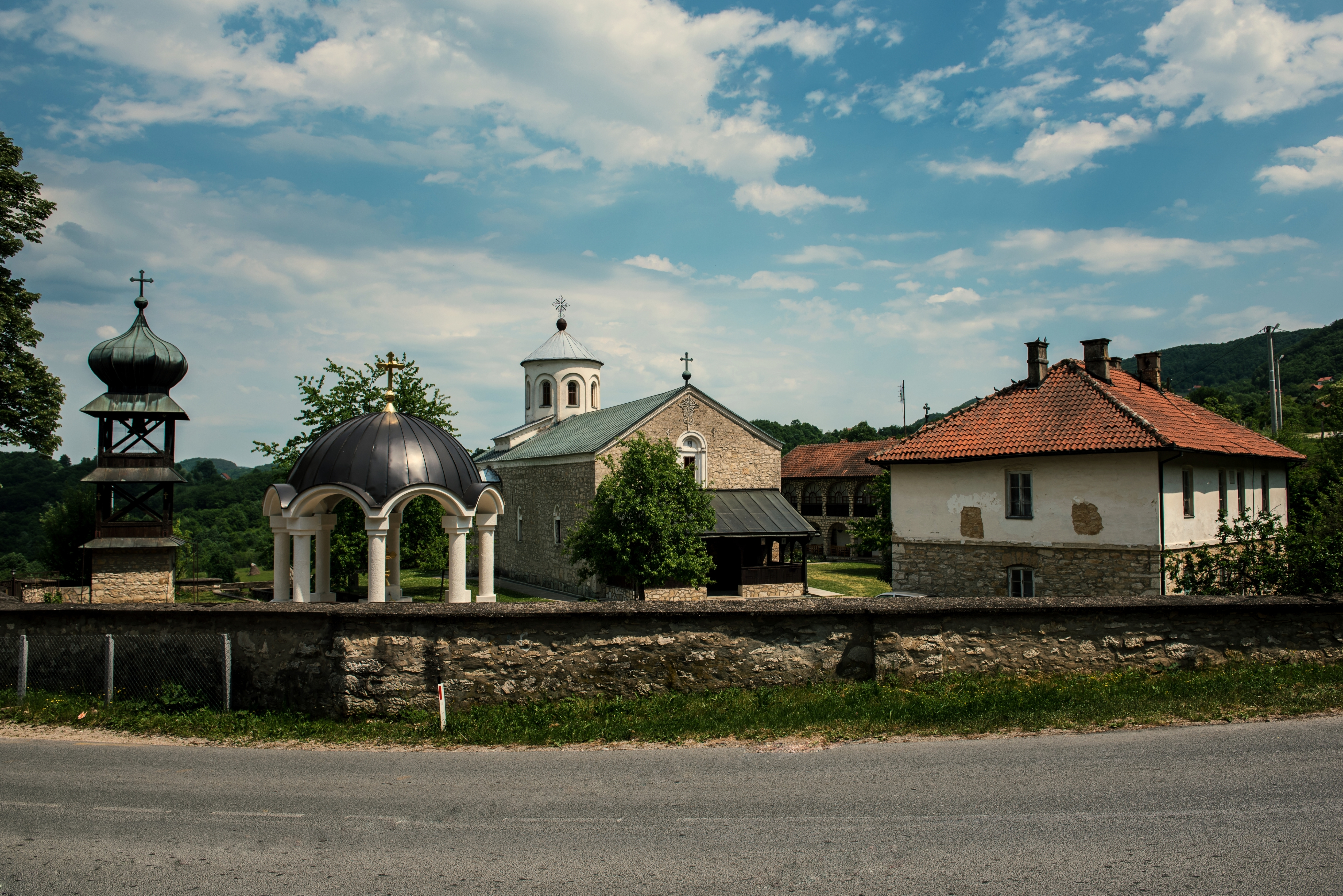 This image was uploaded as part of Trace of Soul 2016.